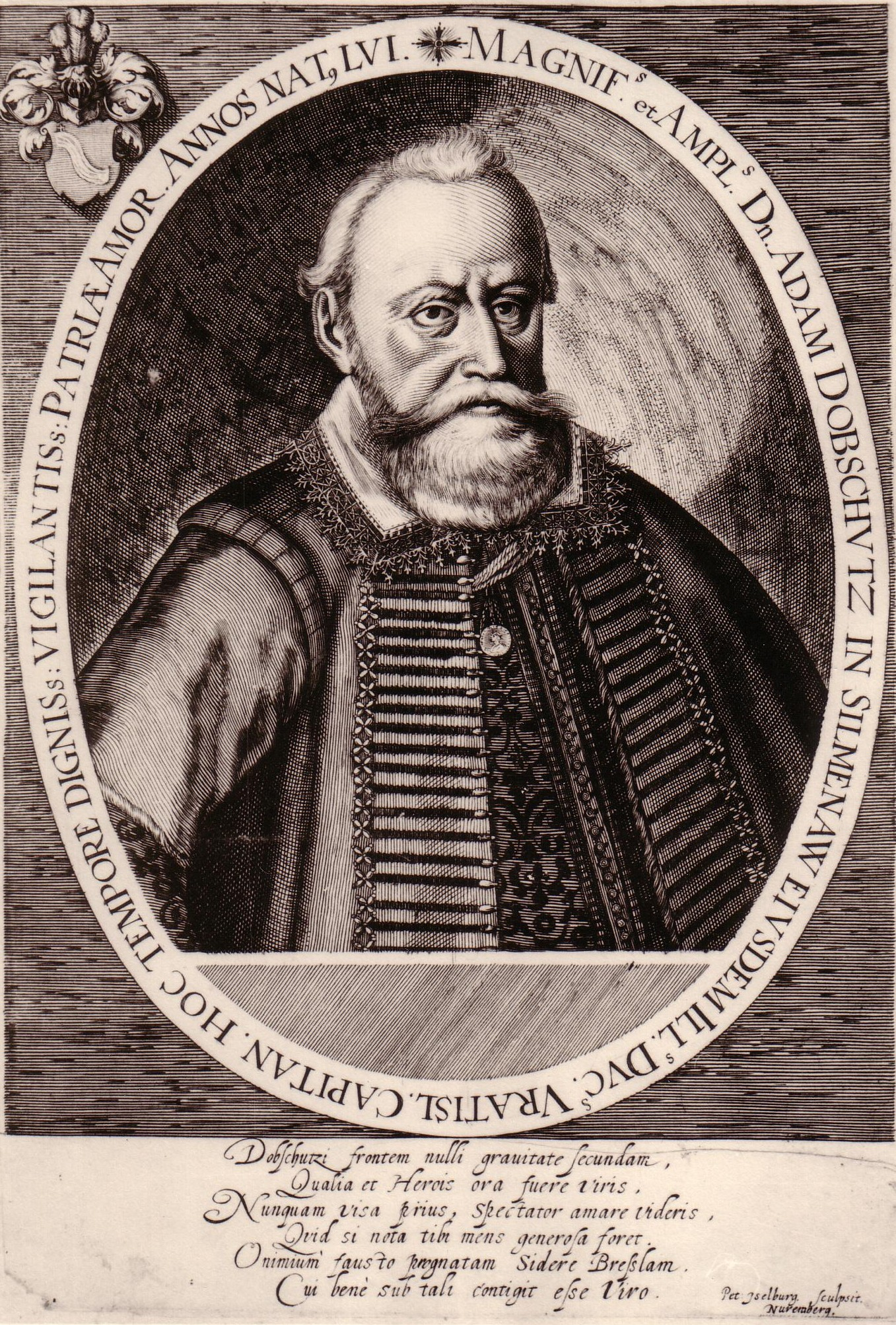 Adam von Dobschütz (1558-1624), Landeshauptmann (Prime Minister) des Fürstentums Breslau